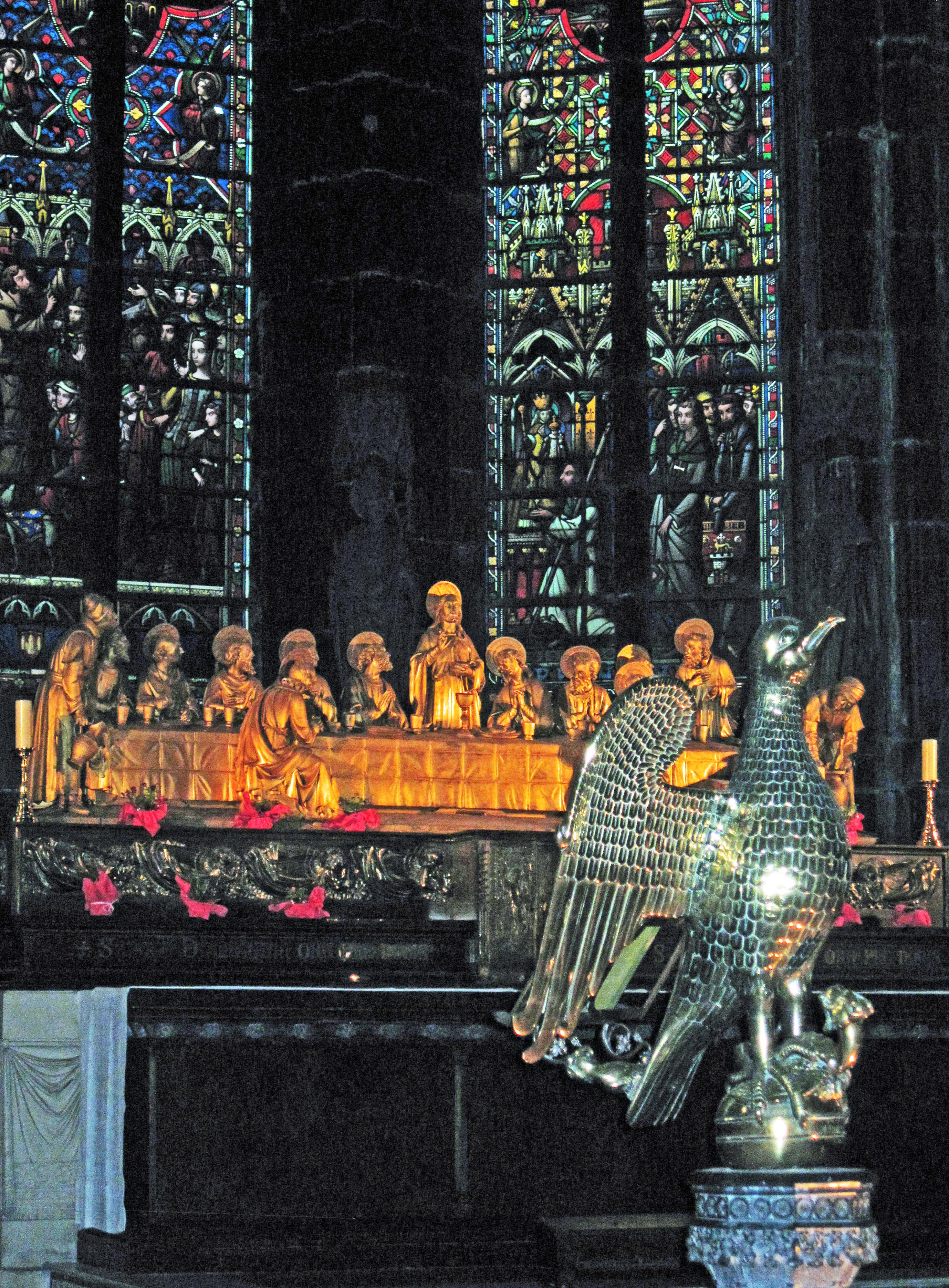 Détail du Choeur de la Collégiale de Huy